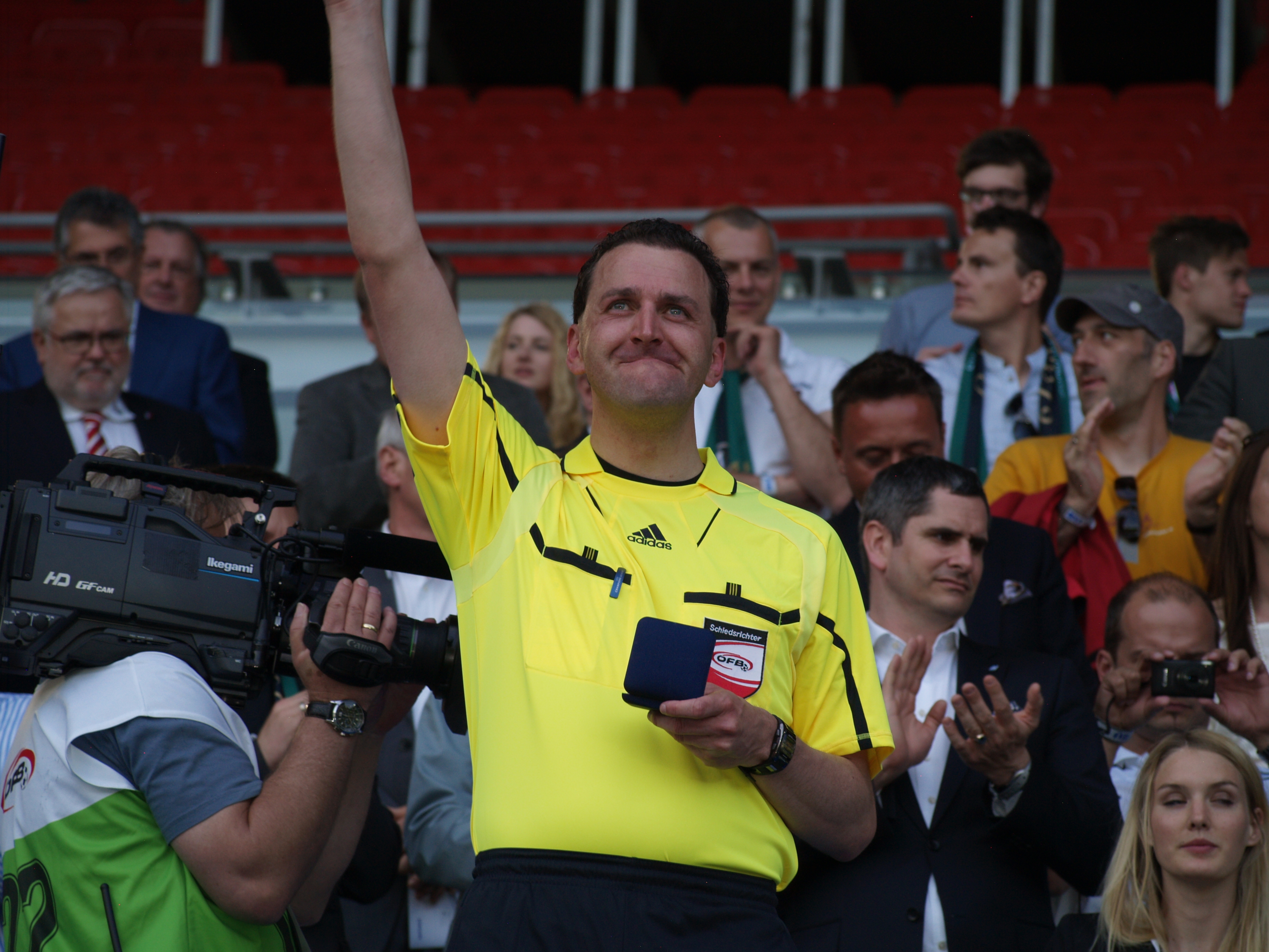 Schiedsrichter Thomas Einwaller bei der Ehrung nach dem ÖFB-Cupfinale 2012